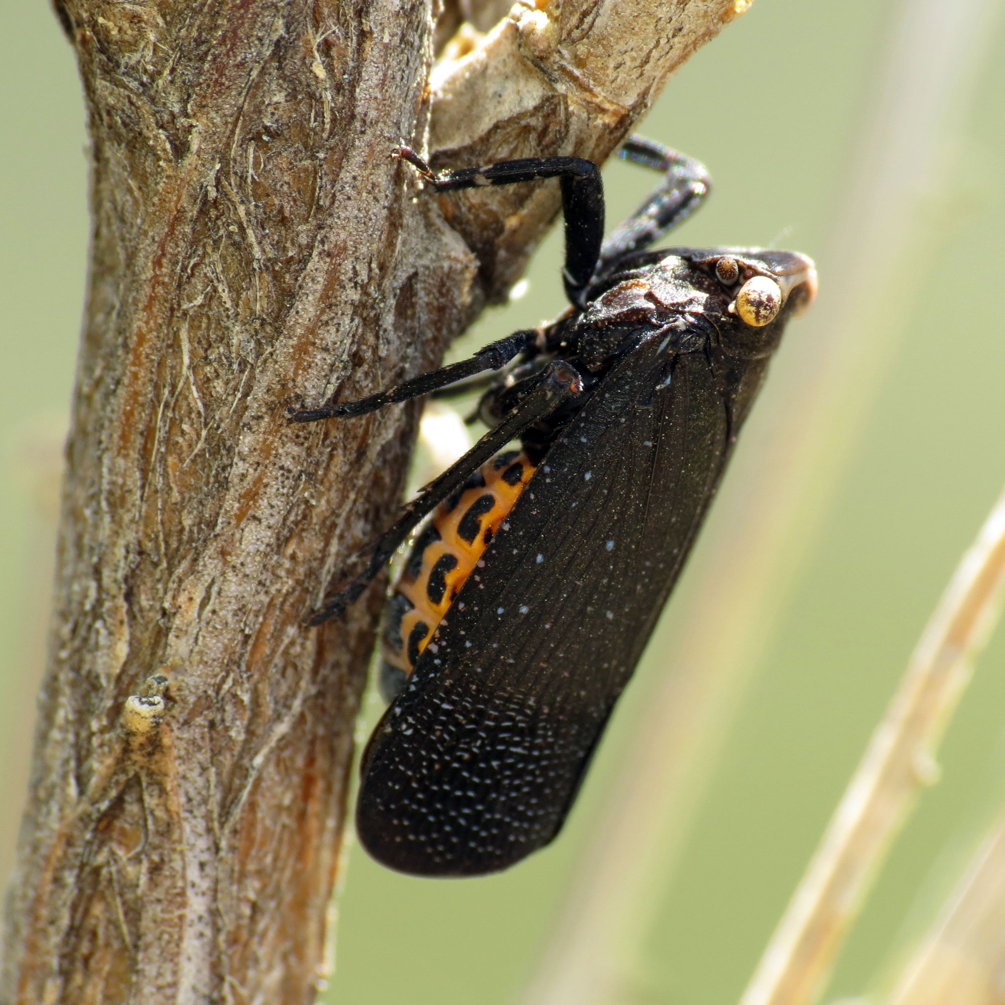 Poblicia fuliginosa. Molino Basin, Santa Catalina Mountains, Pima County, Arizona, USA. 18 September 2012.